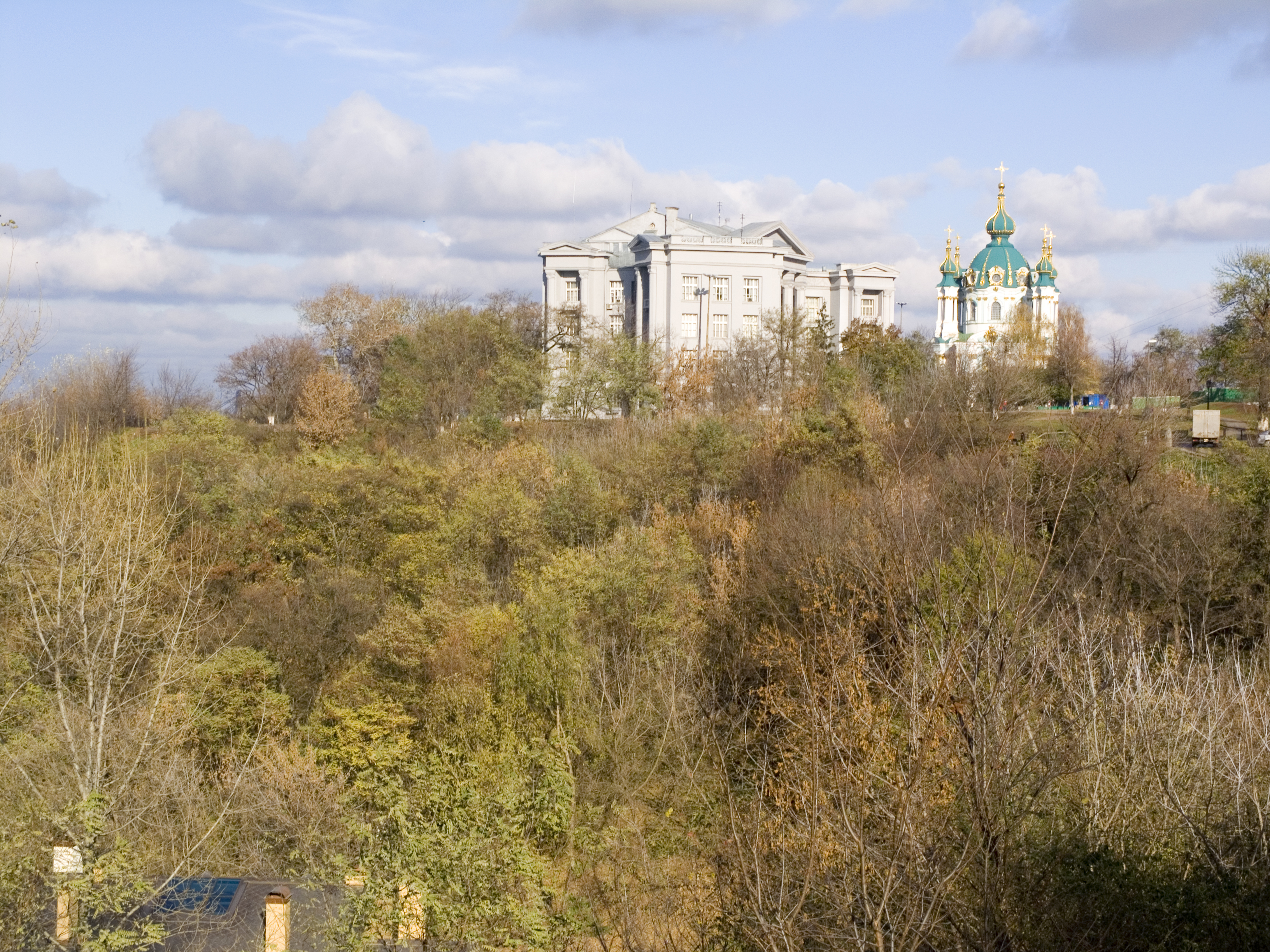 Україна, Київ, Старокиївська гора - Будинок Київської художньої школи ім. Т. Шевченка, де з 1944 р. розміщується Державний історичний музей України, з діяльністю якого і формуванням колекцій пов'язані імена Ернста Ф., Потоцького П., Хвойки В., Біляшівського М., Щербаківського Д. та ін.